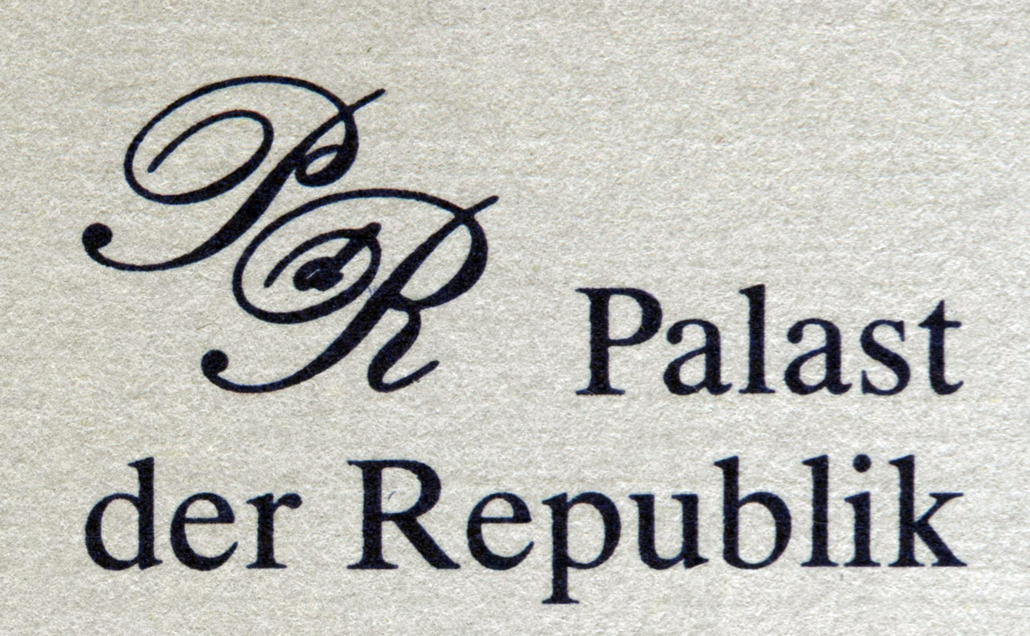 Signet des Palastes der Republik in Berlin. U.a. wurde das Geschirr im Palast damit verziert.